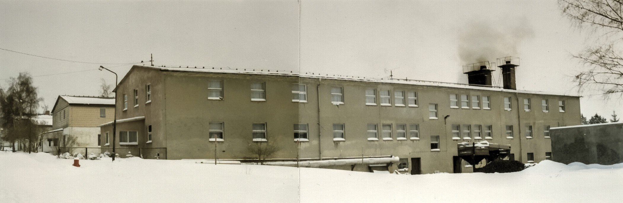 Haus 8 – ein ehemaliges Wismut-Gebäude des Bergbau-Objekts 08 in Neuoberhaus, Johanngeorgenstadt, das später als Wohnheim und Heizhaus der Betriebsschule genutzt wurde. Links hinter dem Haus ist eins der Schulgebäude zu sehen, noch weiter dahinter ist die Kantine. Aufnahme entstand im Winter 1991. Ansicht vom Ende der Neuoberhaus-Straße in Richtung der Häuser.